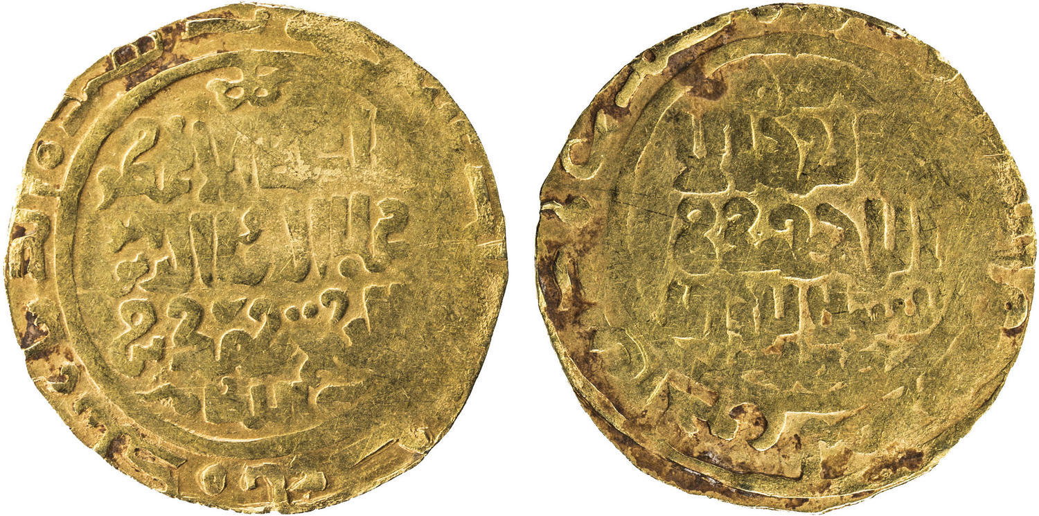 سکه یک دیناری سلطان محمد خوارزمشاه ضرب بلخ